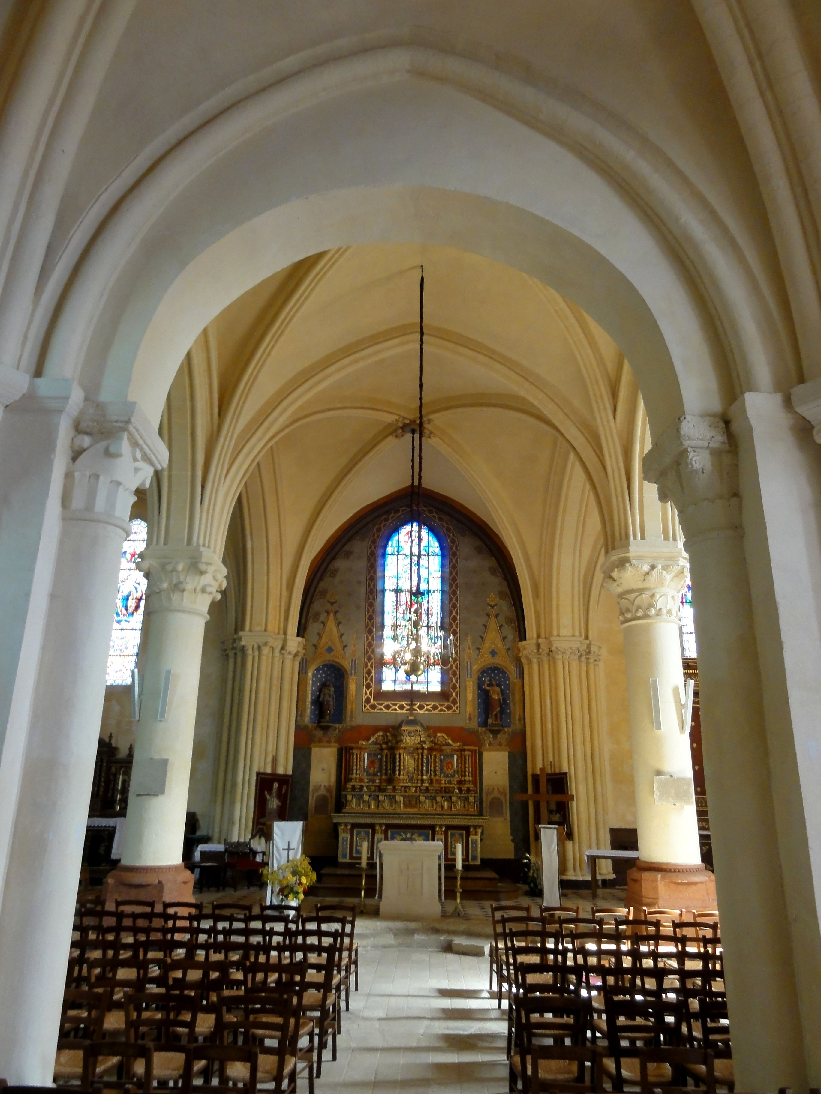 Croisée du transept, vue vers l'est : arcade subsistant de la seconde moitié du XIe siècle quand une abide romane est ajoutée à la chapelle carolingienne.